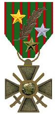 Getekend naar een afbeelding op de Franse Wikipedia.